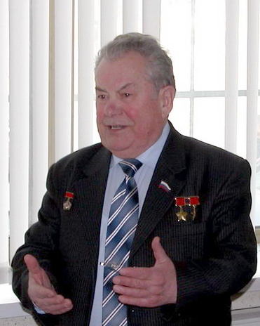 Павел Романович Попович на конференции «Гагаринские чтения», РГТУ «МАТИ» им. К. Э. Циолковского, кафедра «ИЛА»